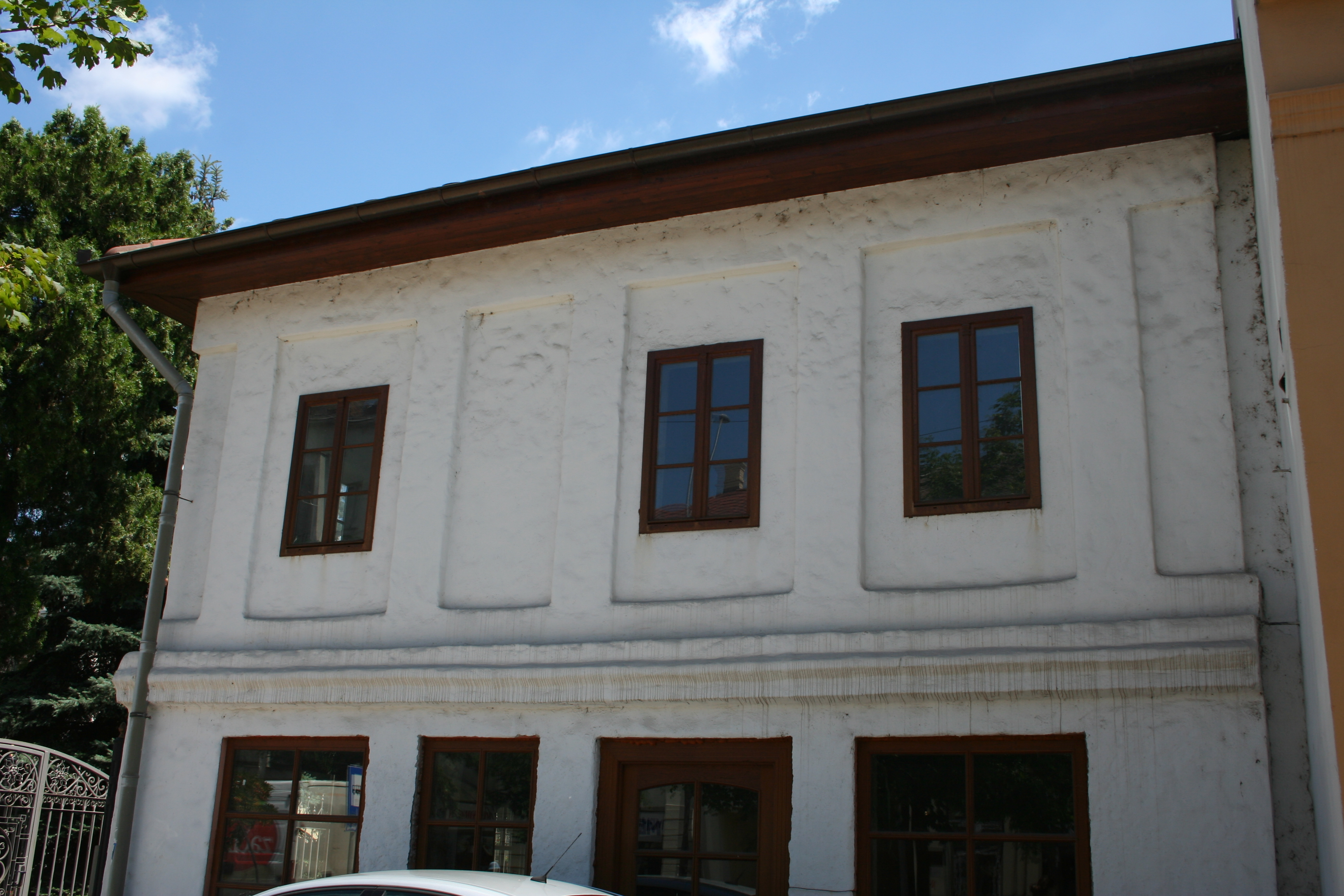 Kuća Jovana Pavlovića